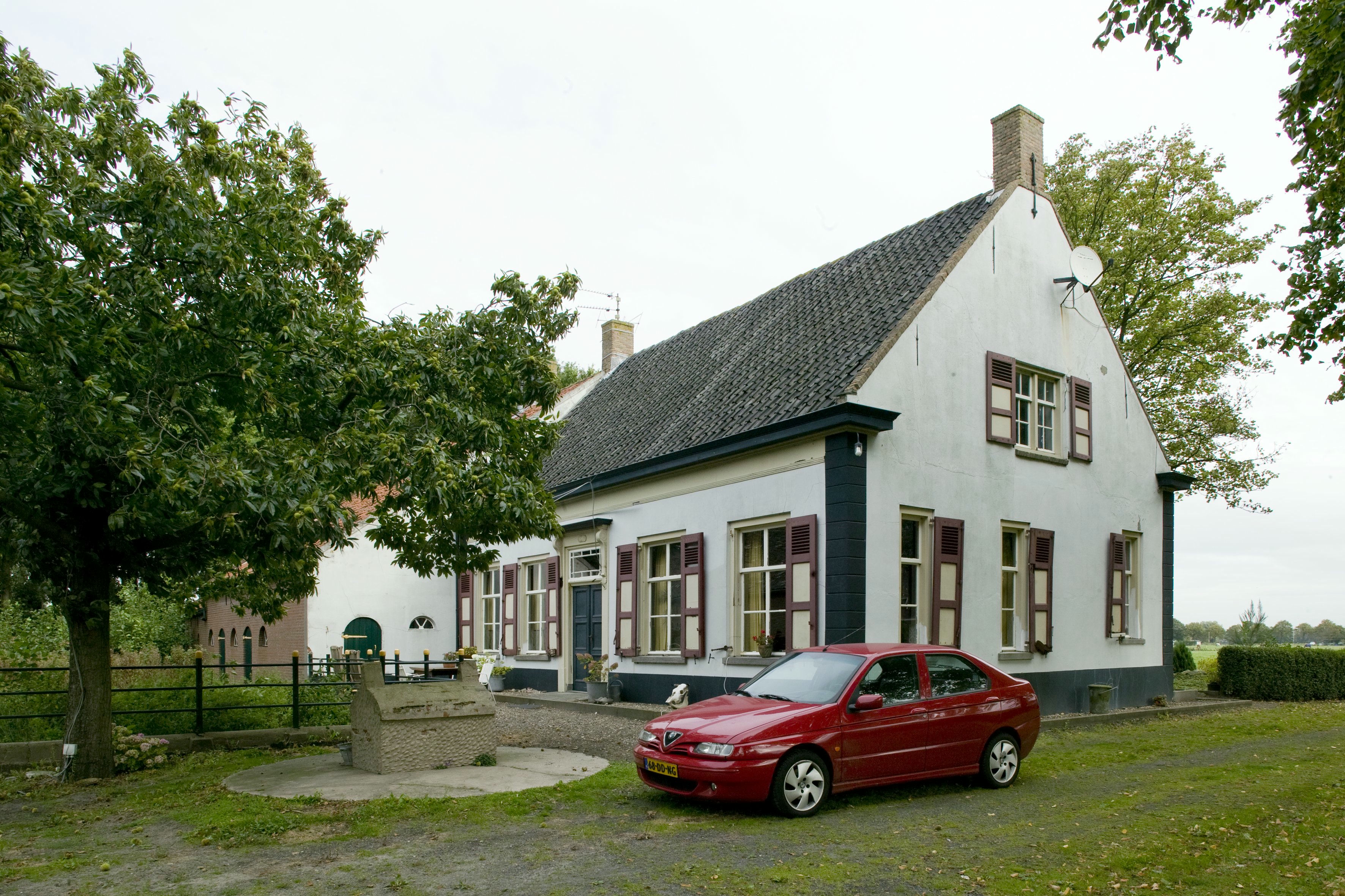 Hoeve Het Slot: Boerderij, linker zijgevel en achtergevel met zesdelige empire schuiframen en luiken